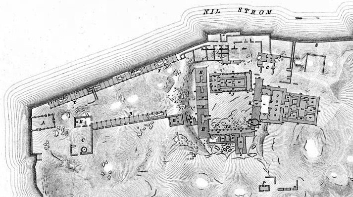 Denkmaeler aus Aegypten und Aethiopien nach den Zeichnungen der von Seiner Majestät dem Koenige von Preussen, Friedrich Wilhelm IV., nach diesen Ländern gesendeten, und in den Jahren 1842–1845 ausgeführten wissenschaftlichen Expedition auf Befehl Seiner Majestät